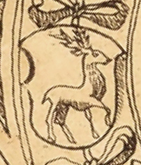 Герб Полоцкого воеводства из польского издания Статута Великого княжества Литовского 1588 года, изданного в 1614 году.